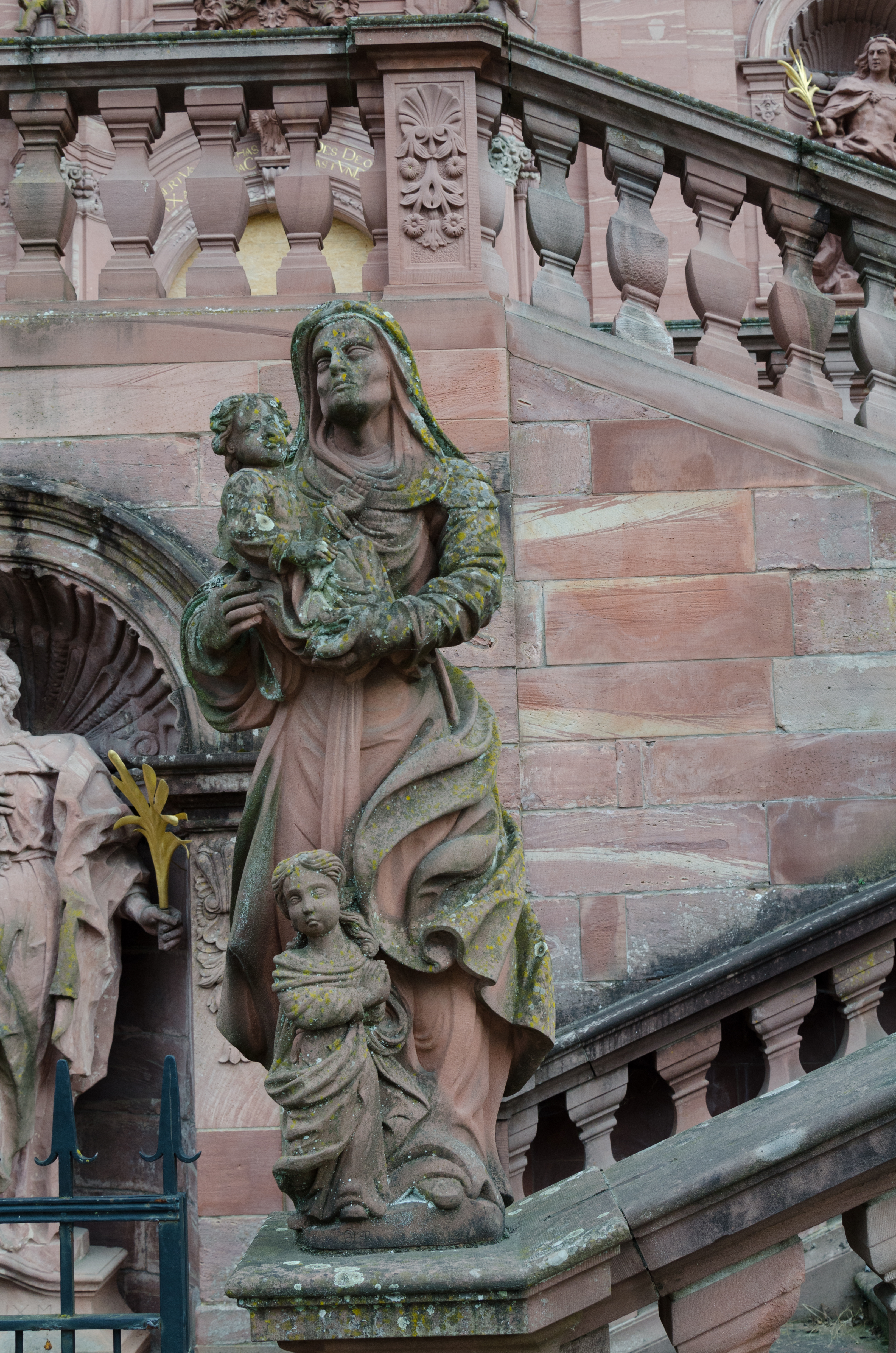 Abteikirche Amorbach